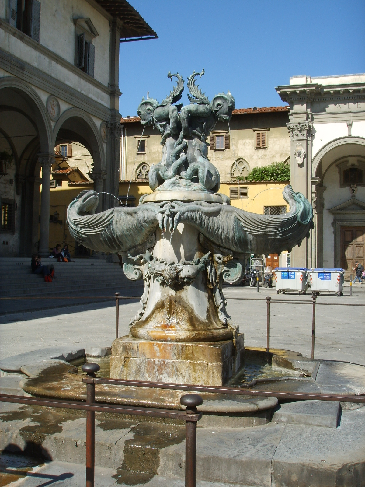 Seconda fontana dei mostri marini